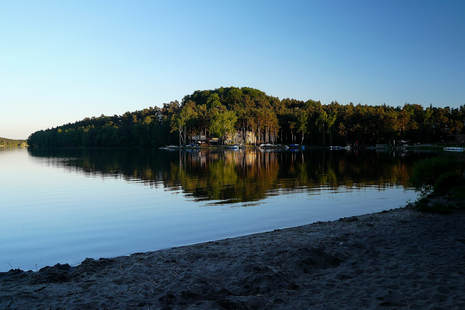 Lázeňský vrch na břehu Máchova jezera, Staré Splavy